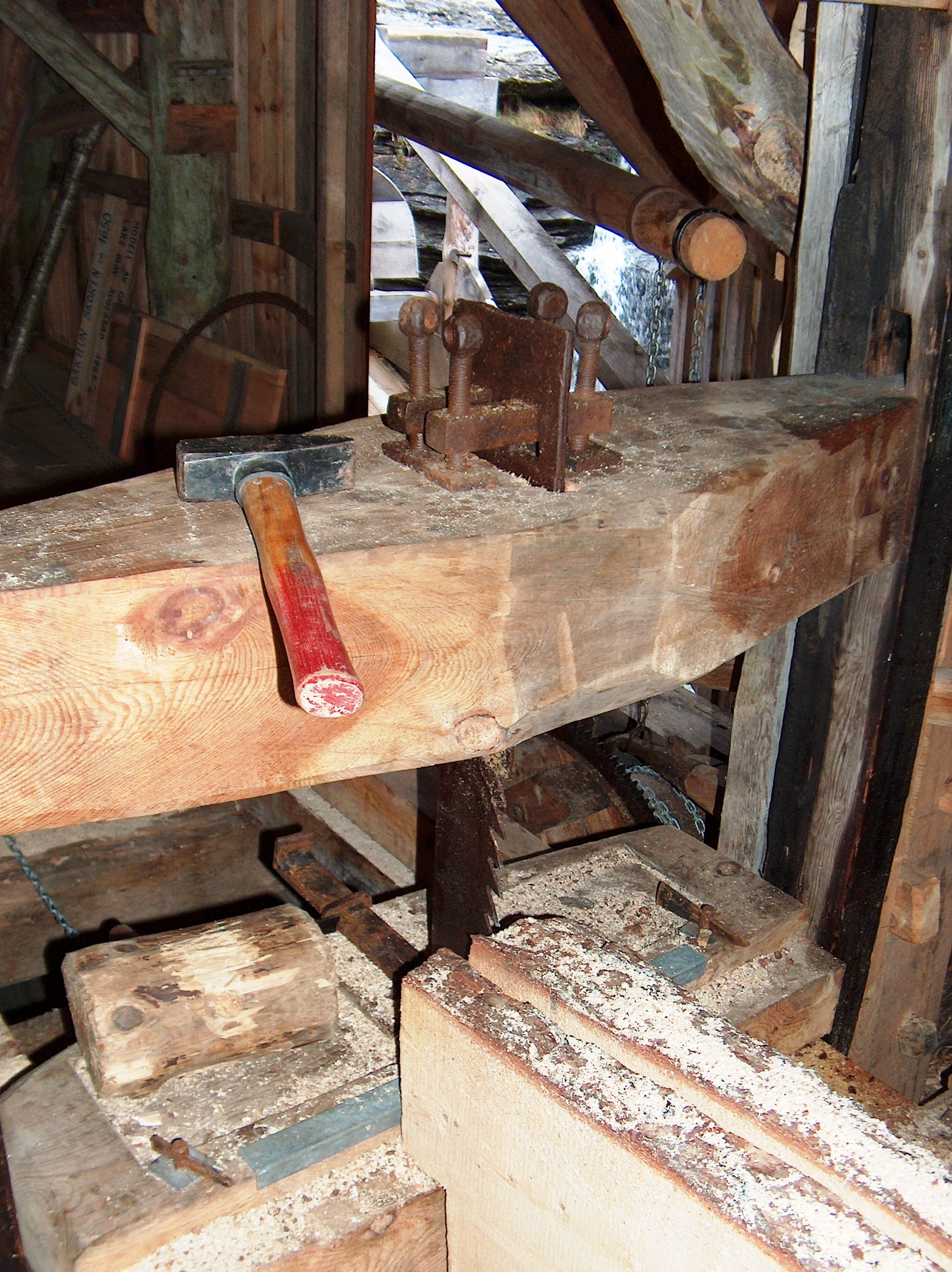 Oppgangsag from Kvam in Norway